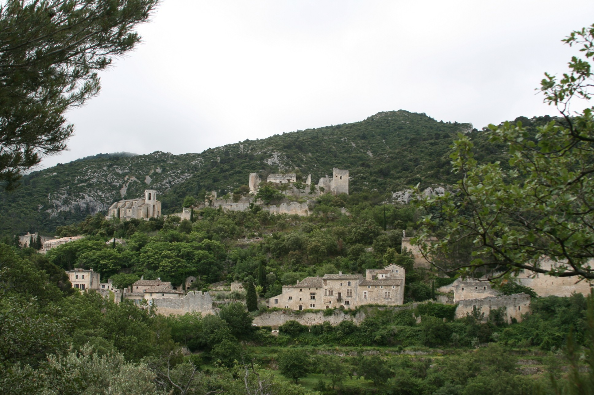 Oppède le Vieux - Vue de l'aire de battage